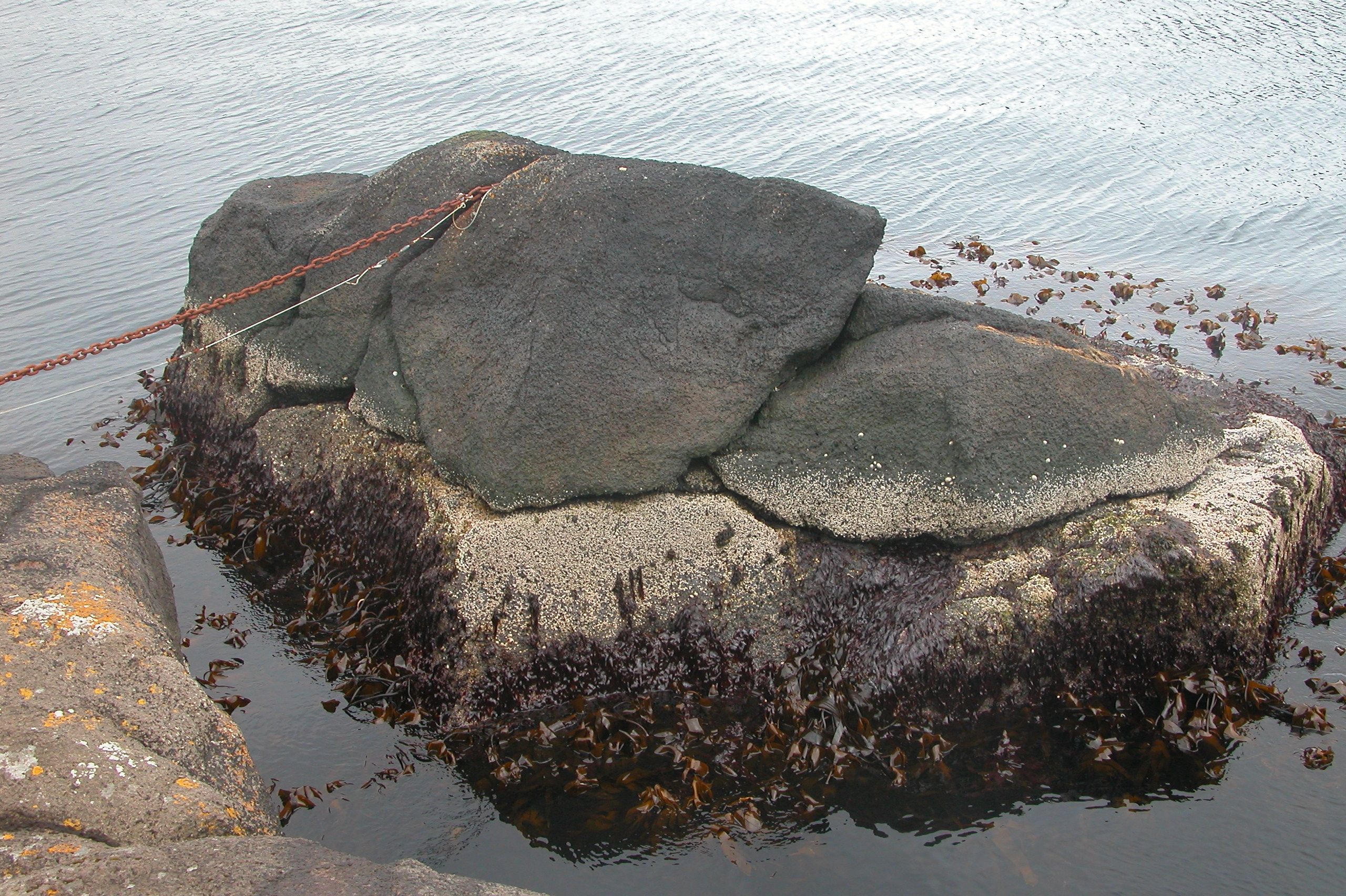 "Rinkusteinar" (Rocking Stones) in Oyndarfjørður, Eysturoy, Faroe Islands.